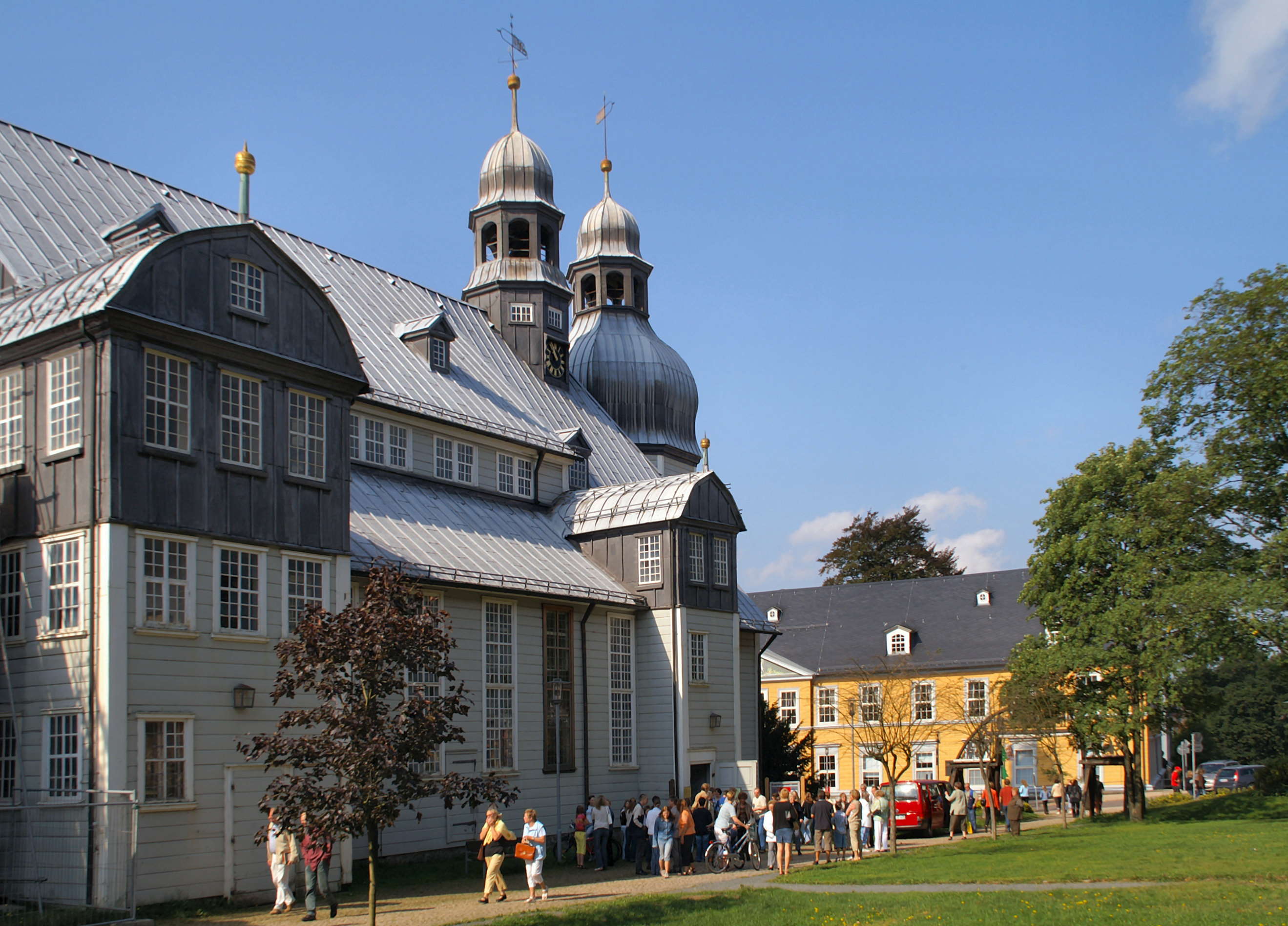 Marktkirche zum Heiligen Geist in Clausthal